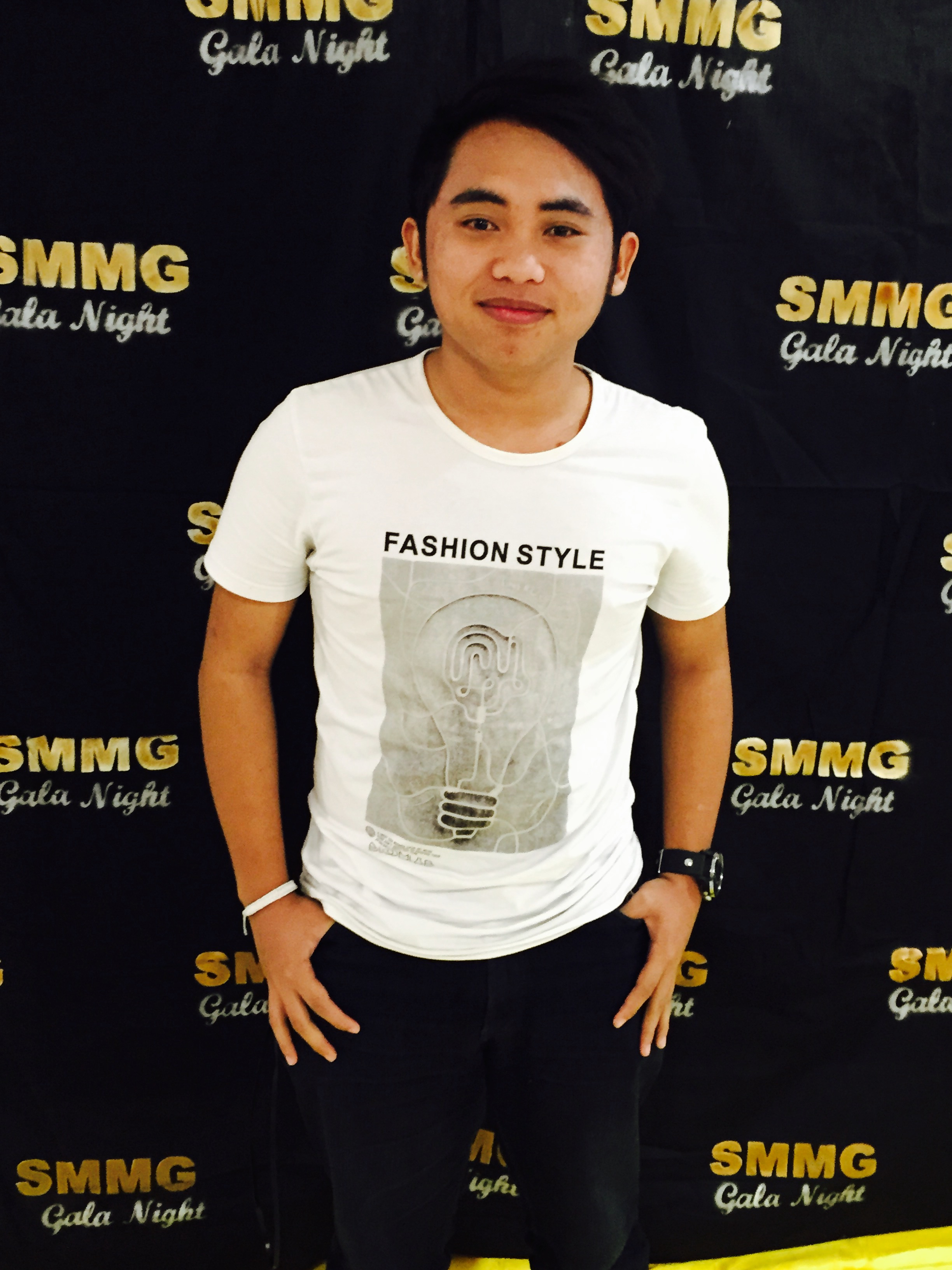 Hasdie Hasnan waktu membuat persembahan pada tahun 2014